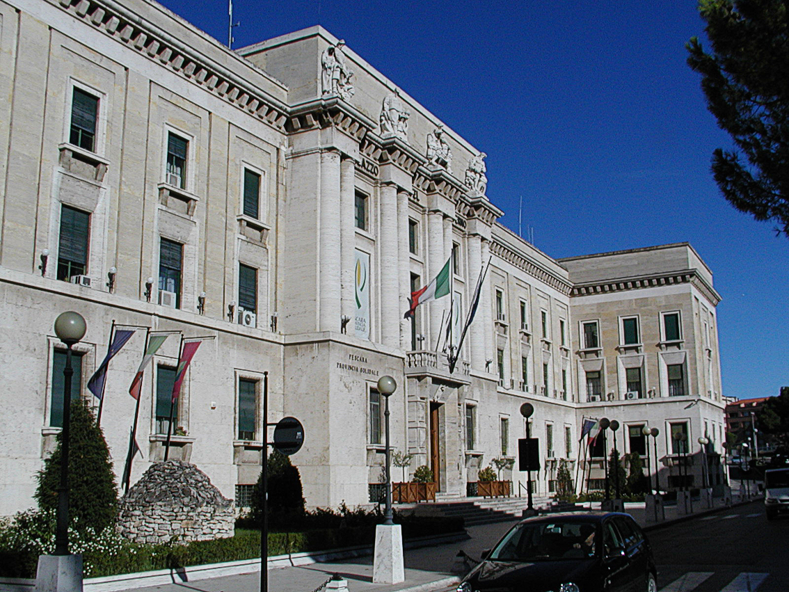 das Gebäude der Provinzverwaltung in Pescara